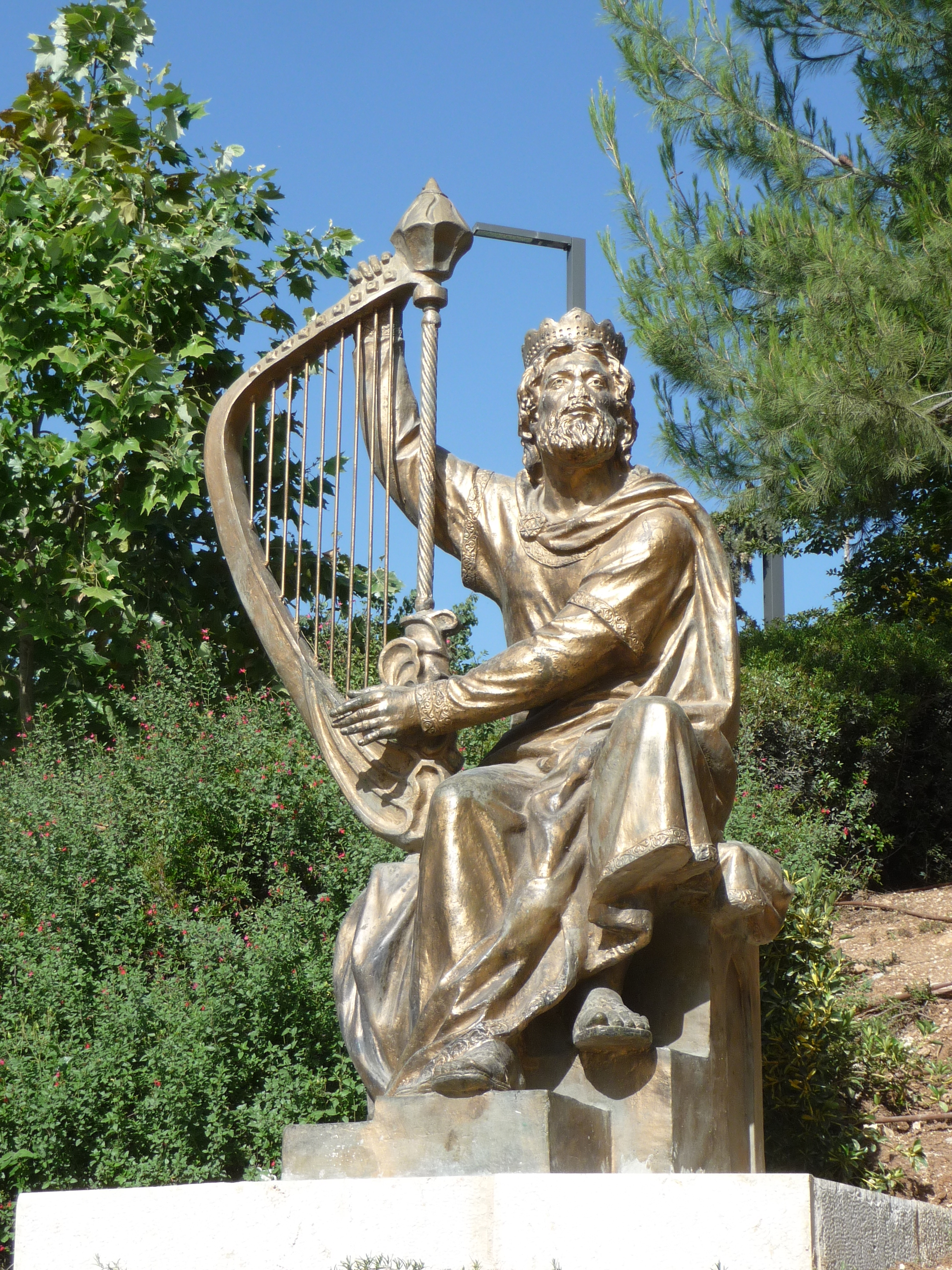 umstrittene Statue des Königs David am Berg Zion